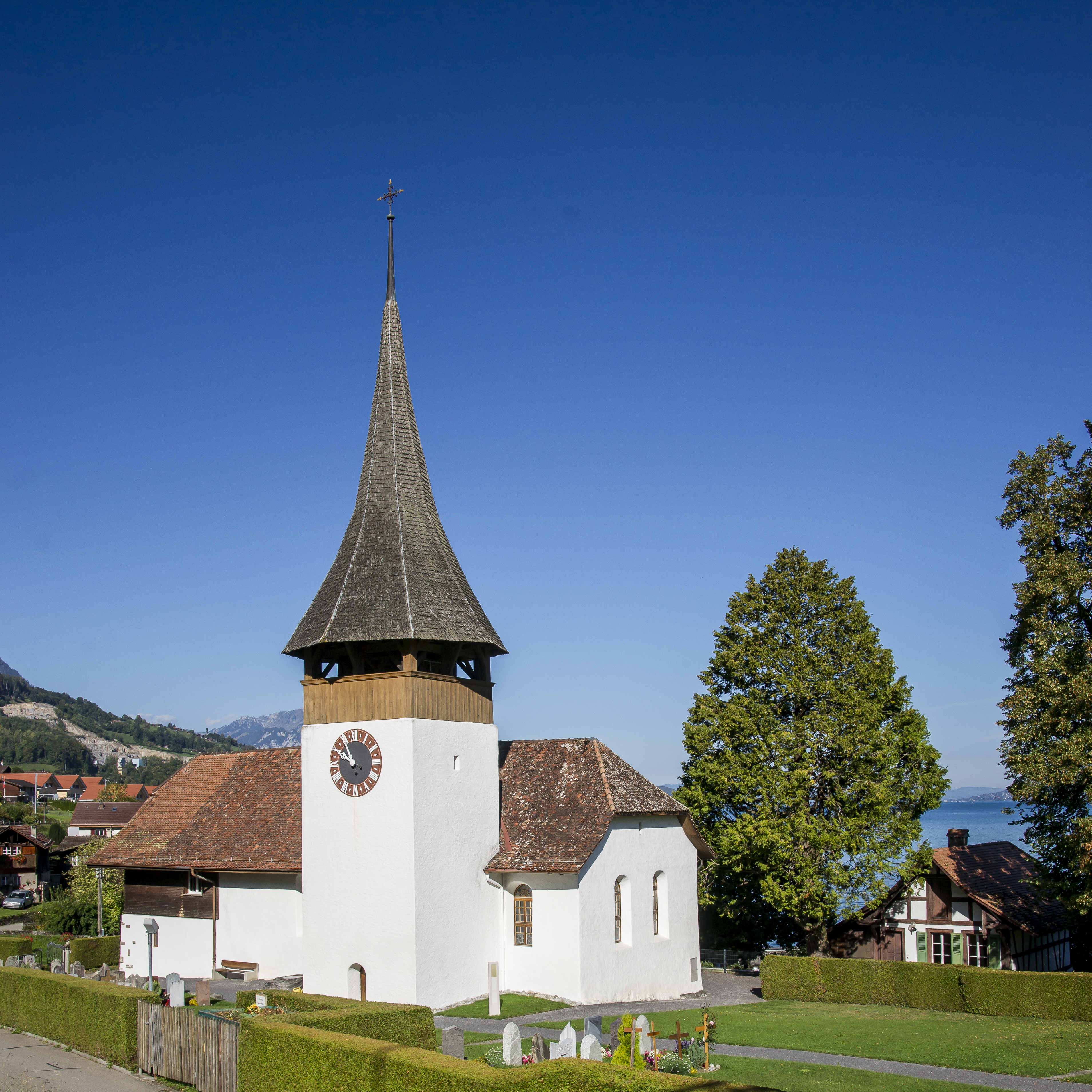 Die Kirche (Johannes der Täufer) in Leissigen gehört zu den 12 Tausendjährigen Kirchen um den Thunersee.